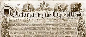 Charte royale britannique de 1851 autorisant la Royal Mail Steam Packet Company à distribuer le courrier en Amérique latine, sur ses lignes à destination de l'Amérique du sud